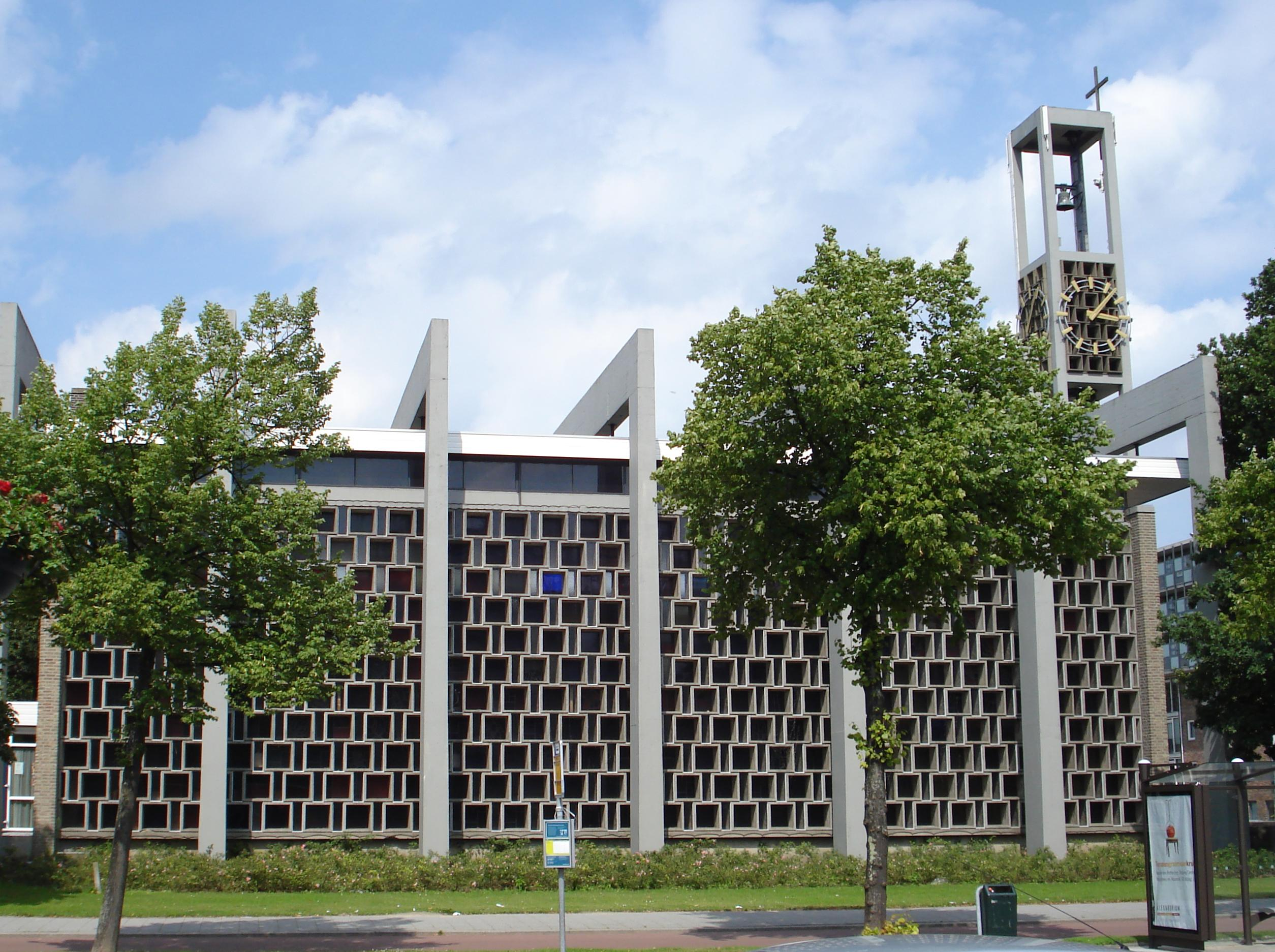 Rotterdam, Pendrecht. St Bavo kerk.